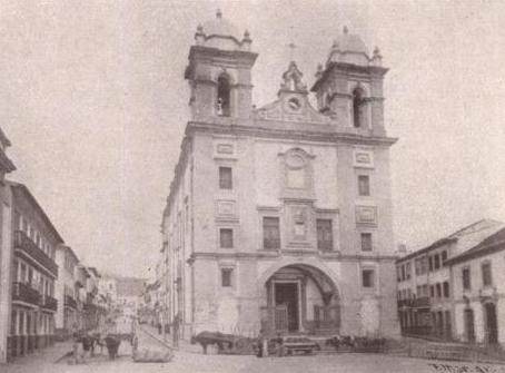 "Cidade de Angra - Egreja da Misericórdia", freguesia da Sé, concelho de Angra do Heroísmo, ilha Terceira, Açores, in Álbum Açoriano, fascículo nº 41, 1903, p. 328.